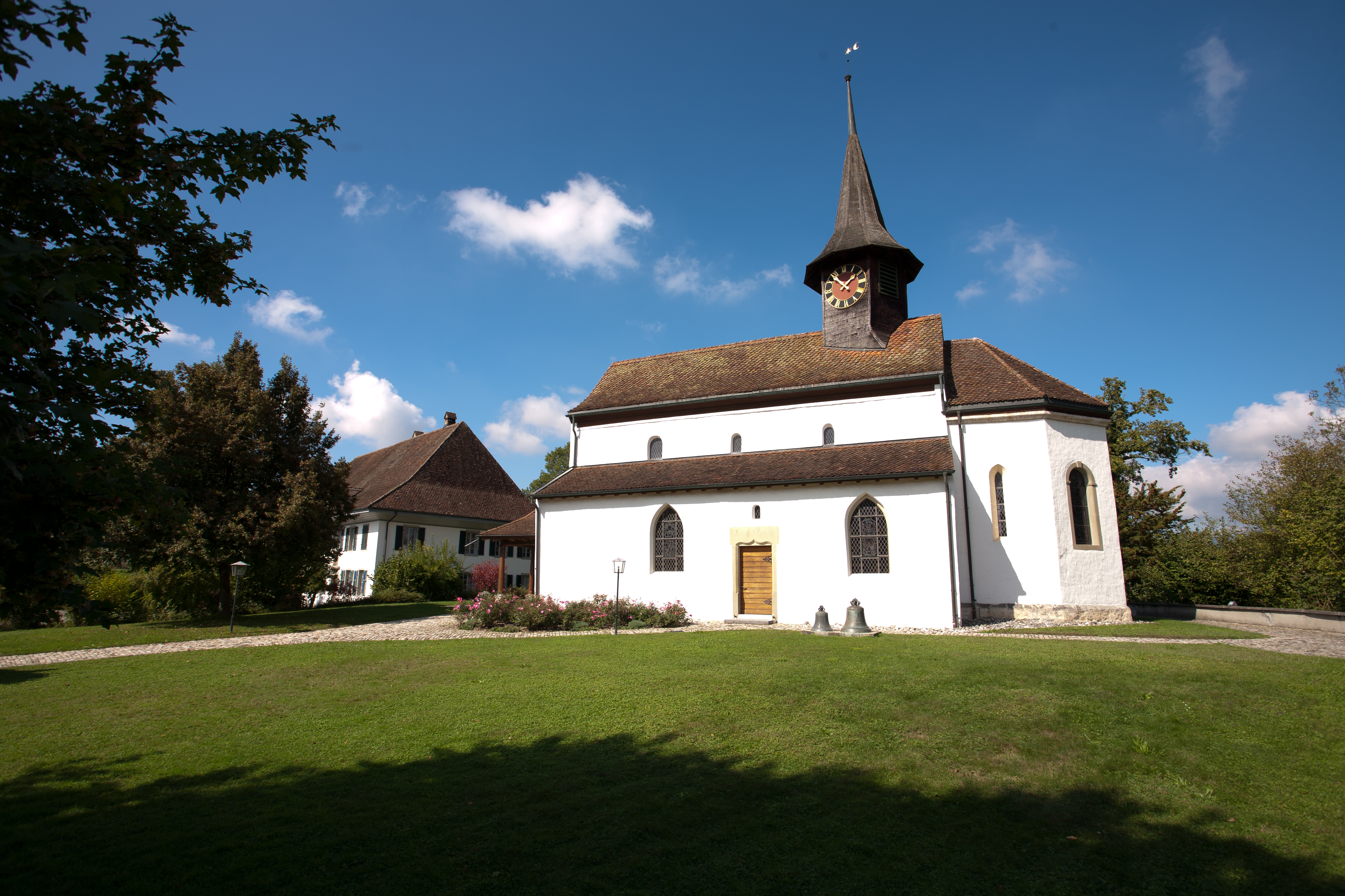 Wynau Reformierte Kirche